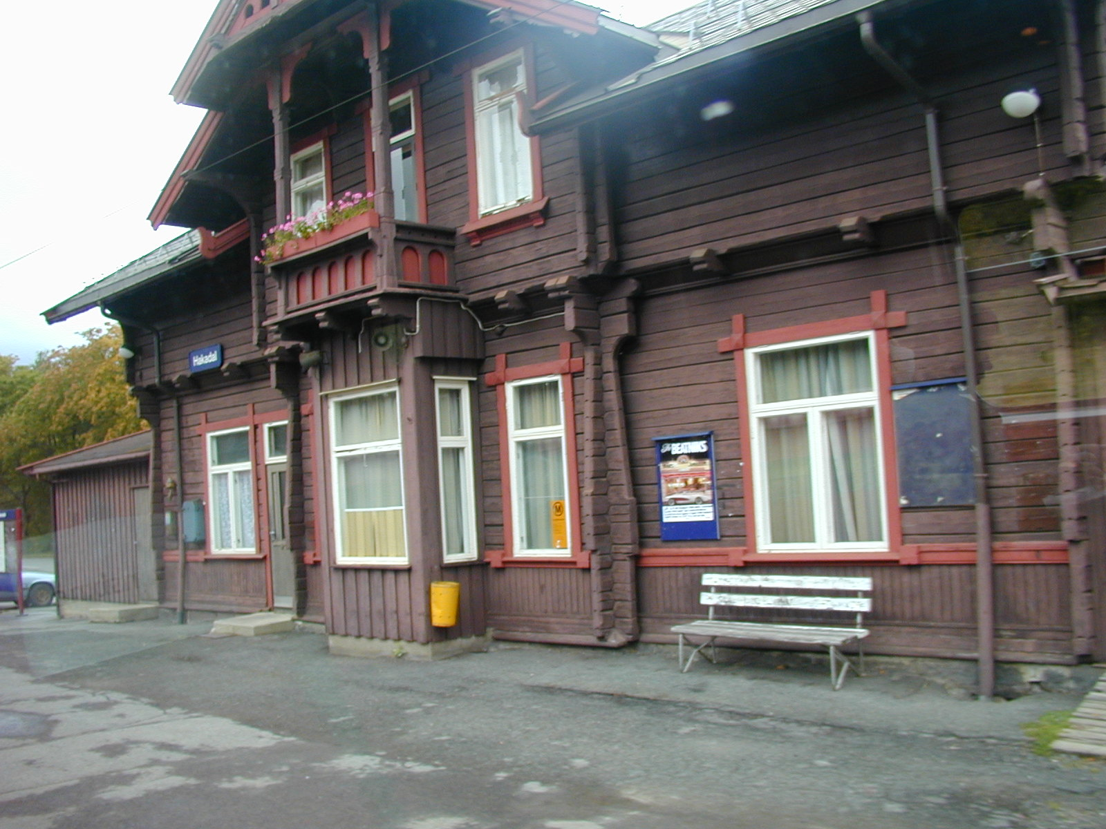 Hakadal stasjon